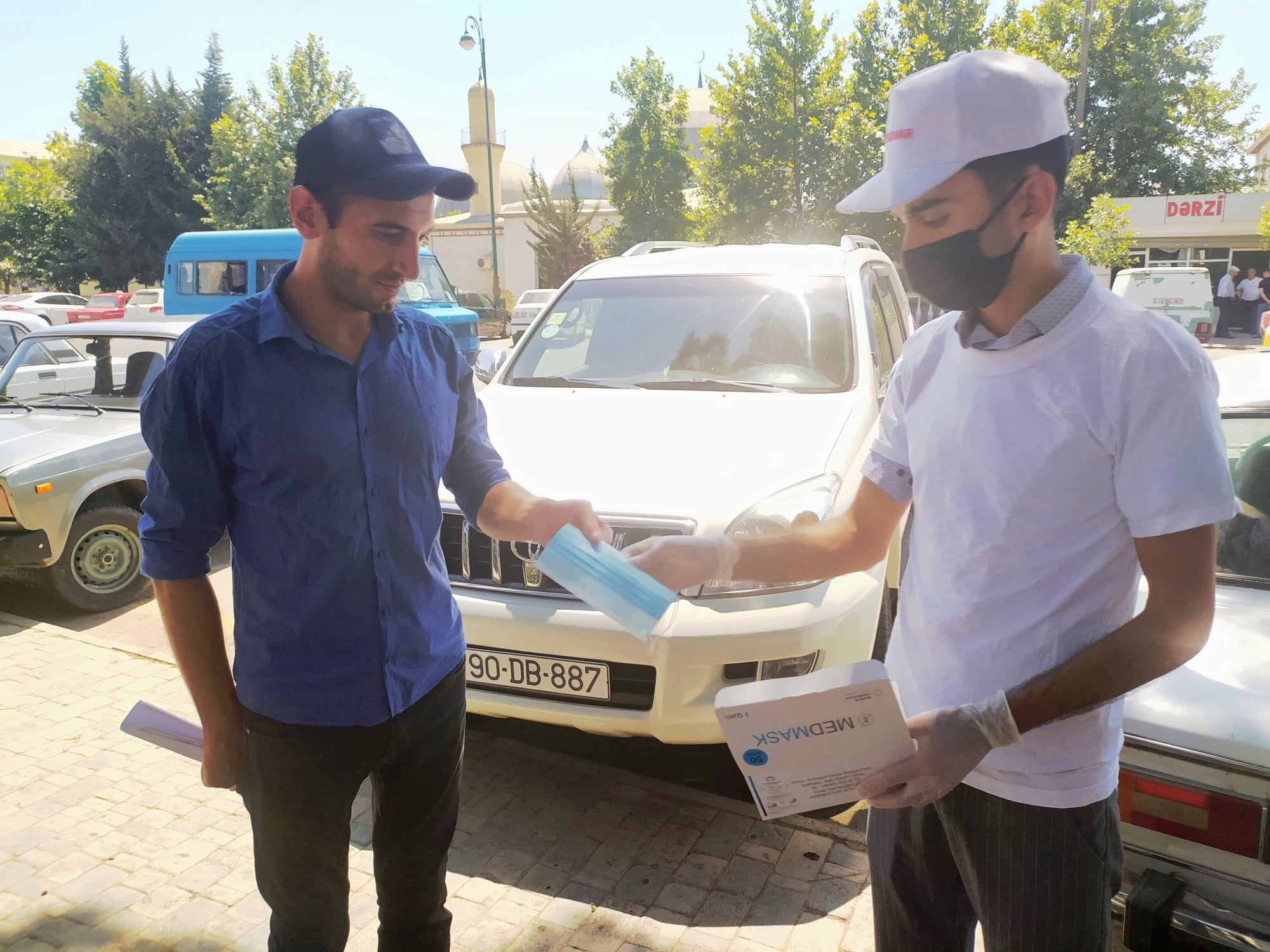 Könüllümüz tibbi maska paylarkən